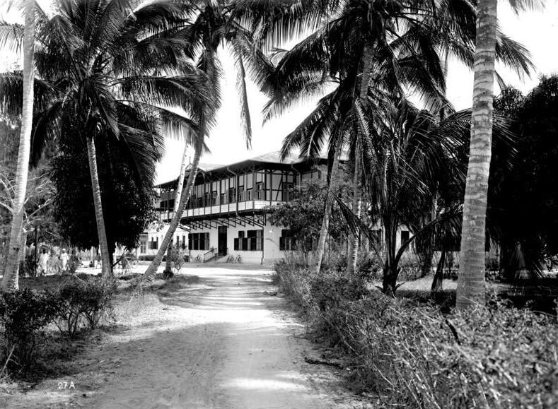 Haus I in Daressalam, Sitz des Gouvernements